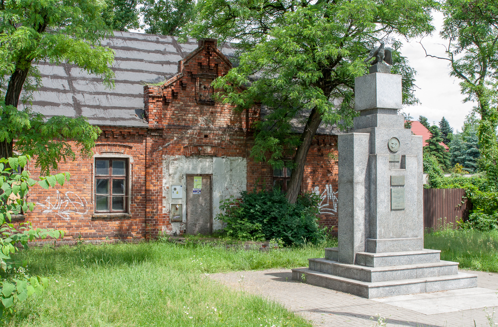 Pomnik poświęcony pamięci Józefa Piłsudskiego oraz poległych w obronie ojczyzny w latach 1918-1920. W tle budynek dawnej "Murowanki". Napisy: Wokół profilu Piłsudskiego: JÓZEF PIŁSUDSKI Najwyższa tablica ROK 1930 PIERWSZEMU MARSZAŁKOWI JÓZEFOWI PIŁSUDSKIEMU BUDOWNICZEMU POLSKI ODRODZONEJ W DZIESIĄTĄ ROCZNICĘ WYZWOLENIA OJCZYZNY OD NAJAZDU BOLSZEWICKIEGO Środkowa tablica: OBYWATELE WAWRA I GMINY WAWER PADLI NA POLU CHWAŁY ODPIERAJĄC OD GRANIC PAŃSTWA POLSKIEGO POD WODZĄ JÓZEFA PIŁSUDSKIEGO NAWAŁĘ NAJEŹDŹCÓW W LATACH 1918-1920 Dolna tablica: OSMELIŃSKI JÓZEF UCZEŃ PEŁKA MICHAŁ ROBOTNIK WÓJTOWICZ JÓZEF ROBOTNIK 1 LISTOPADA 1930 Lokalizacja pomnika: okolica ul.Płowiecka 77 w Warszawie (w Wawrze)